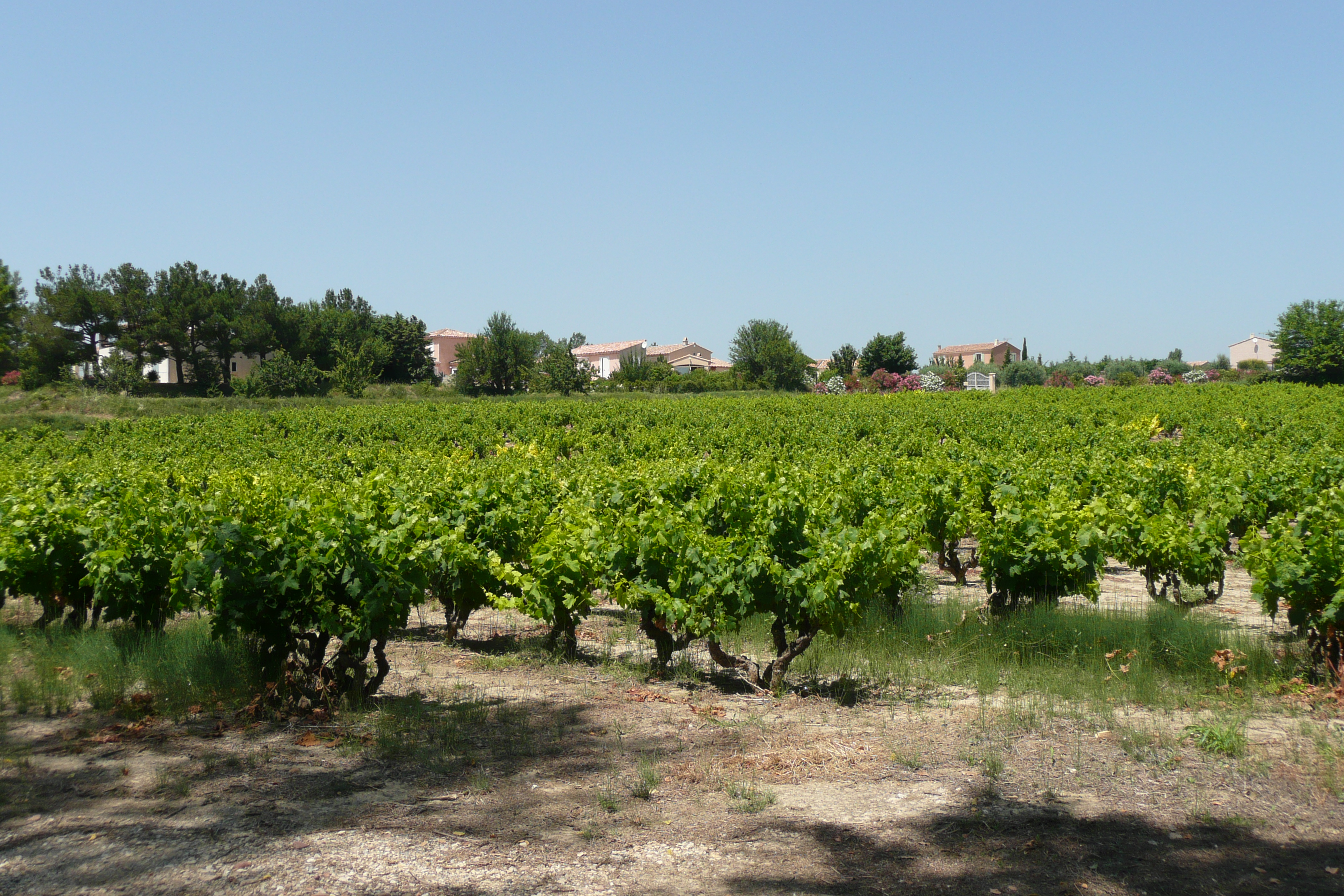 Domazan.